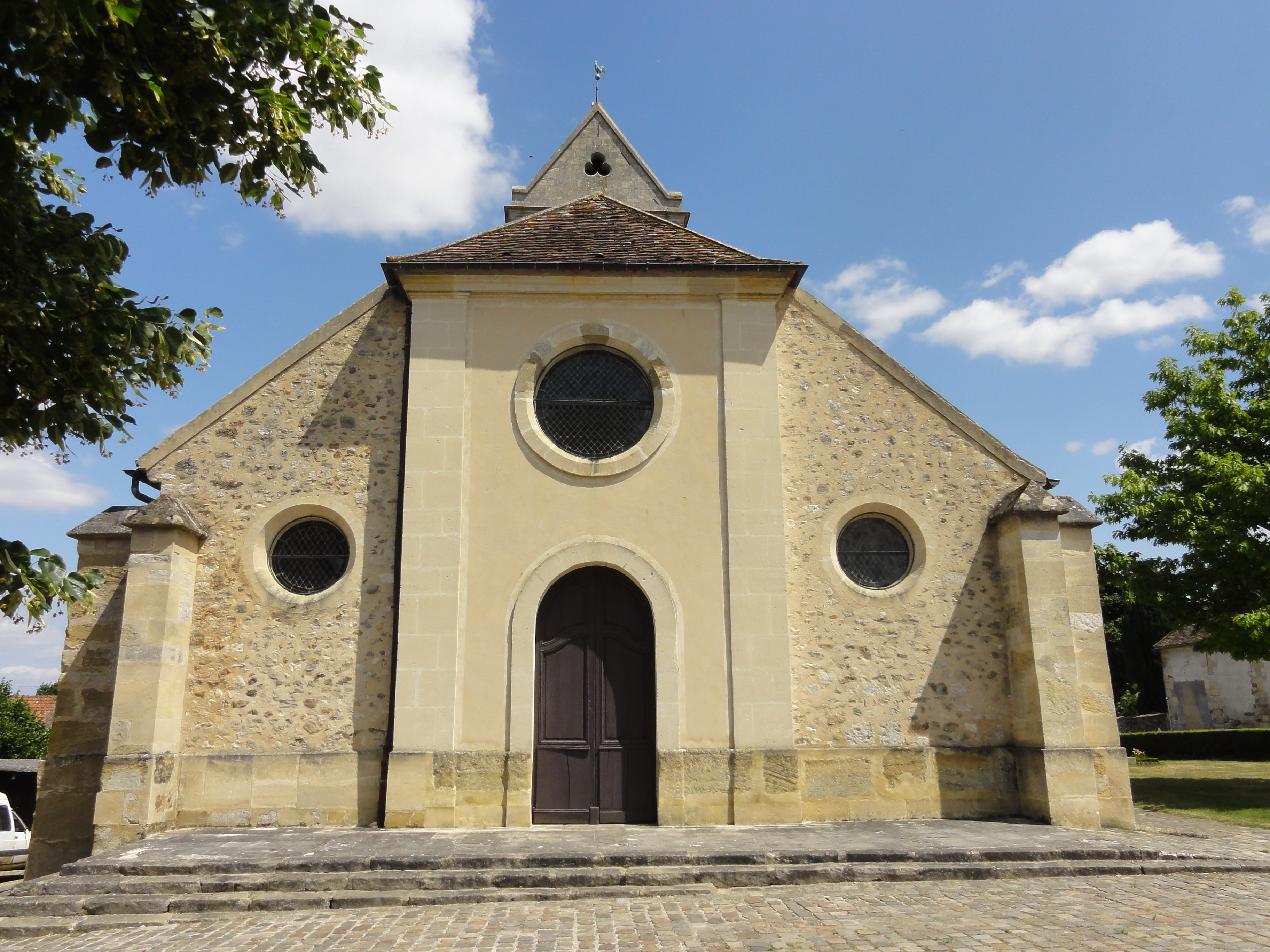 Voir titre.